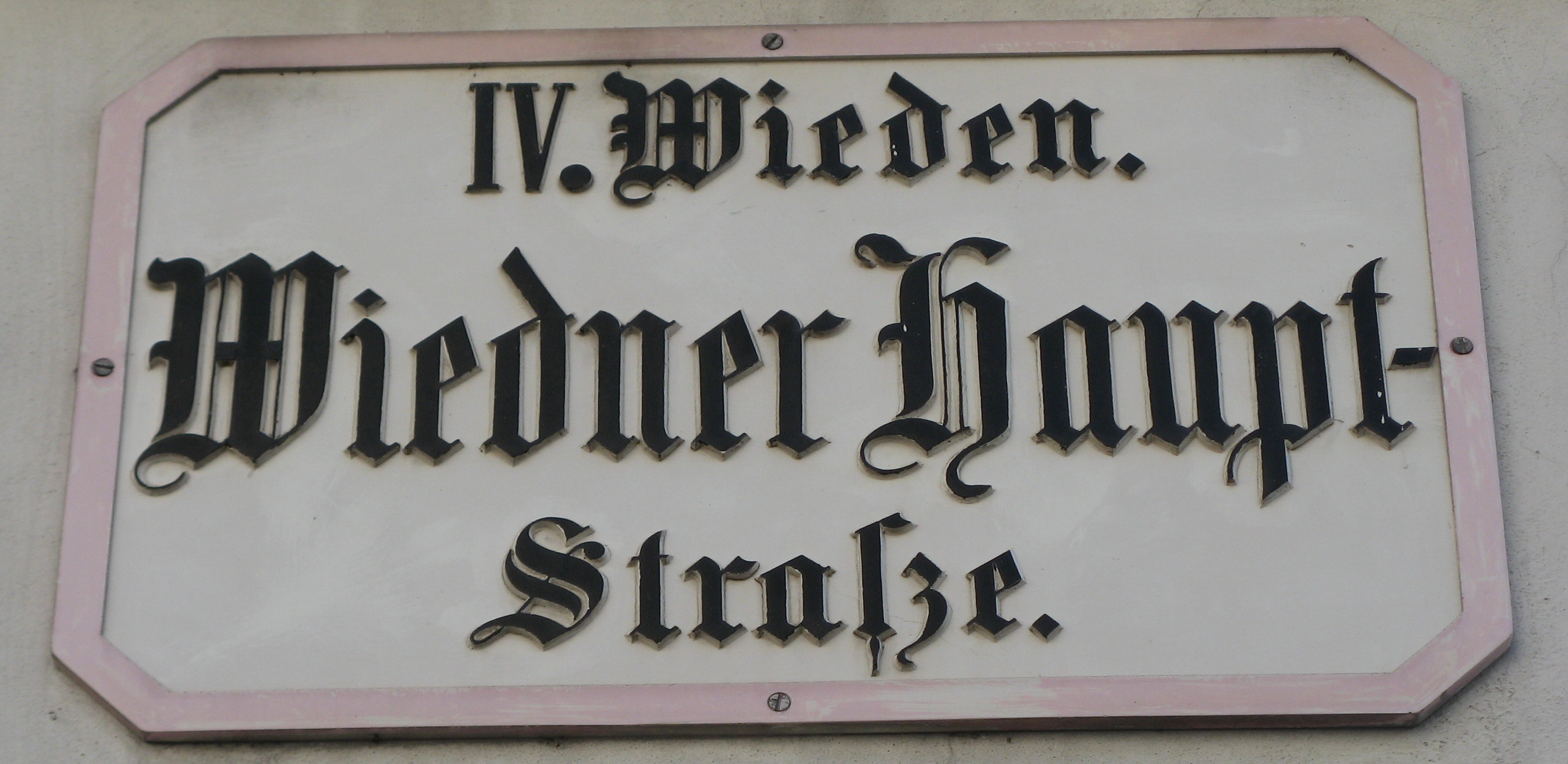 Historisches Straßenschild Wiedner Hauptstraße, Wien-Wieden